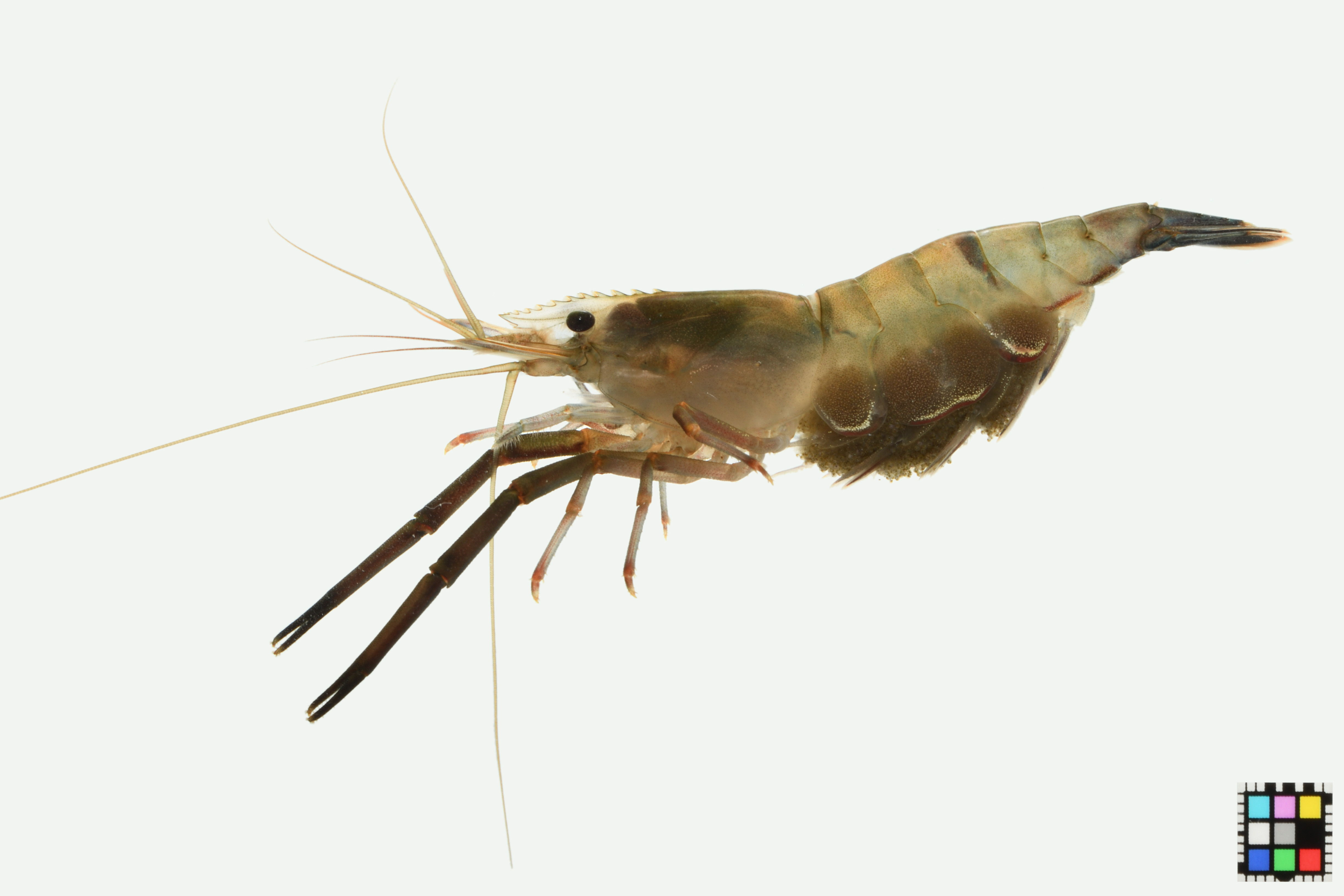 抱卵したヒラテテナガエビのメス．詳細